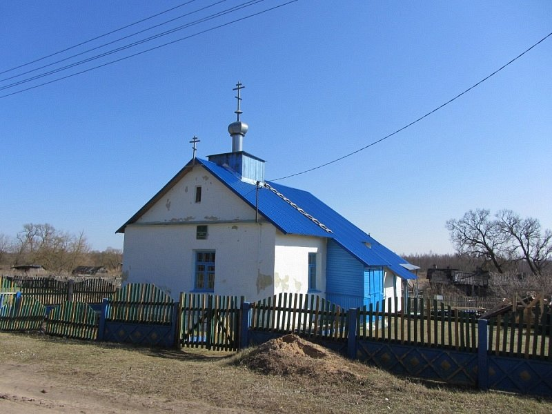 Асінторф. Замалёўкі